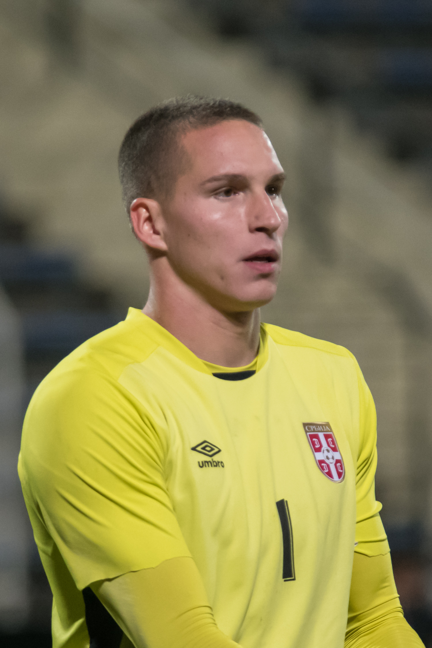 U21 Europameisterschaftsqualifikationsspiel Österreich gegen Serbien am 11.10.2017 in der BSFZ-Arena Maria Enzersdorf. Bild zeigt: Boris Radunović